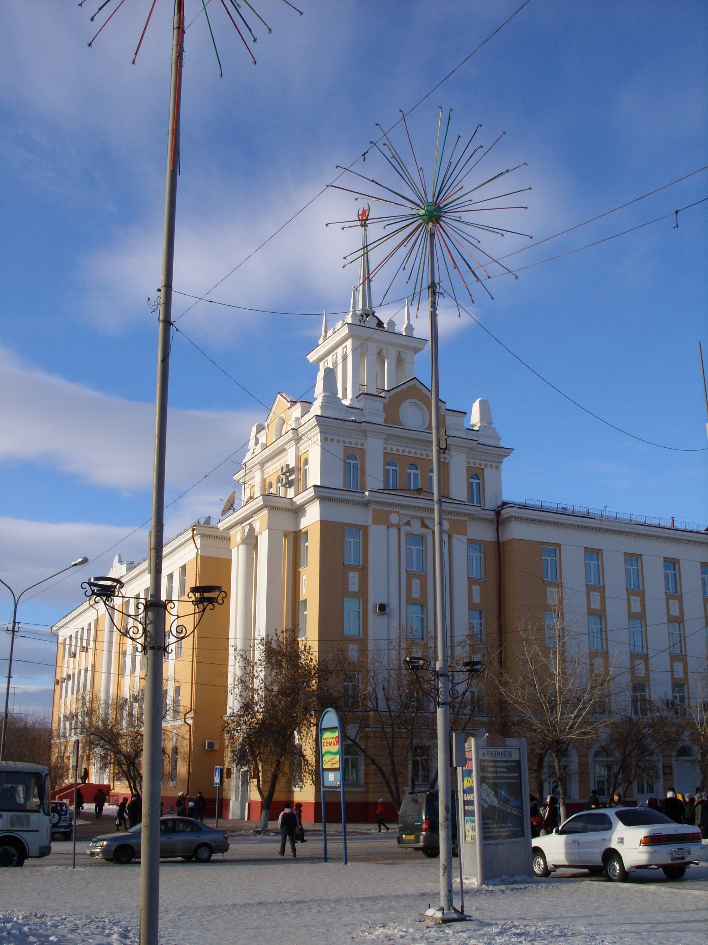 снимки декабря 2008 г.